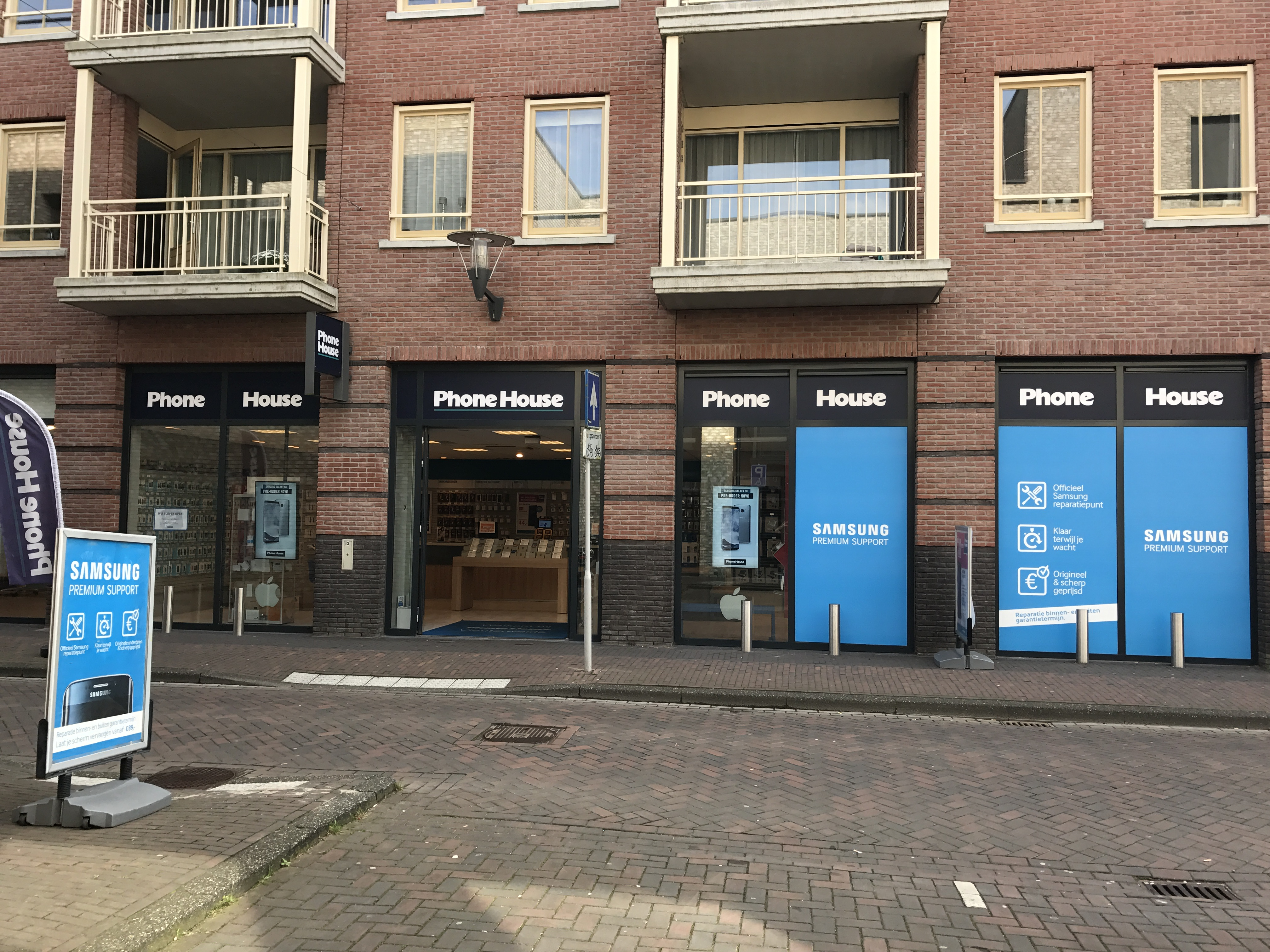 Phone House Vleuten Gevel